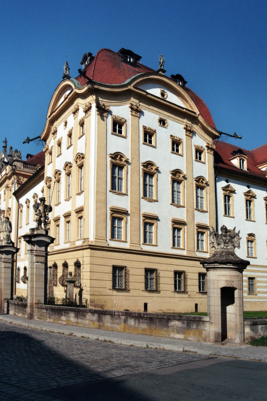 Deutschordensresidenz Ellingen, Bayern: Zufahrt von Seiten der Stadt.